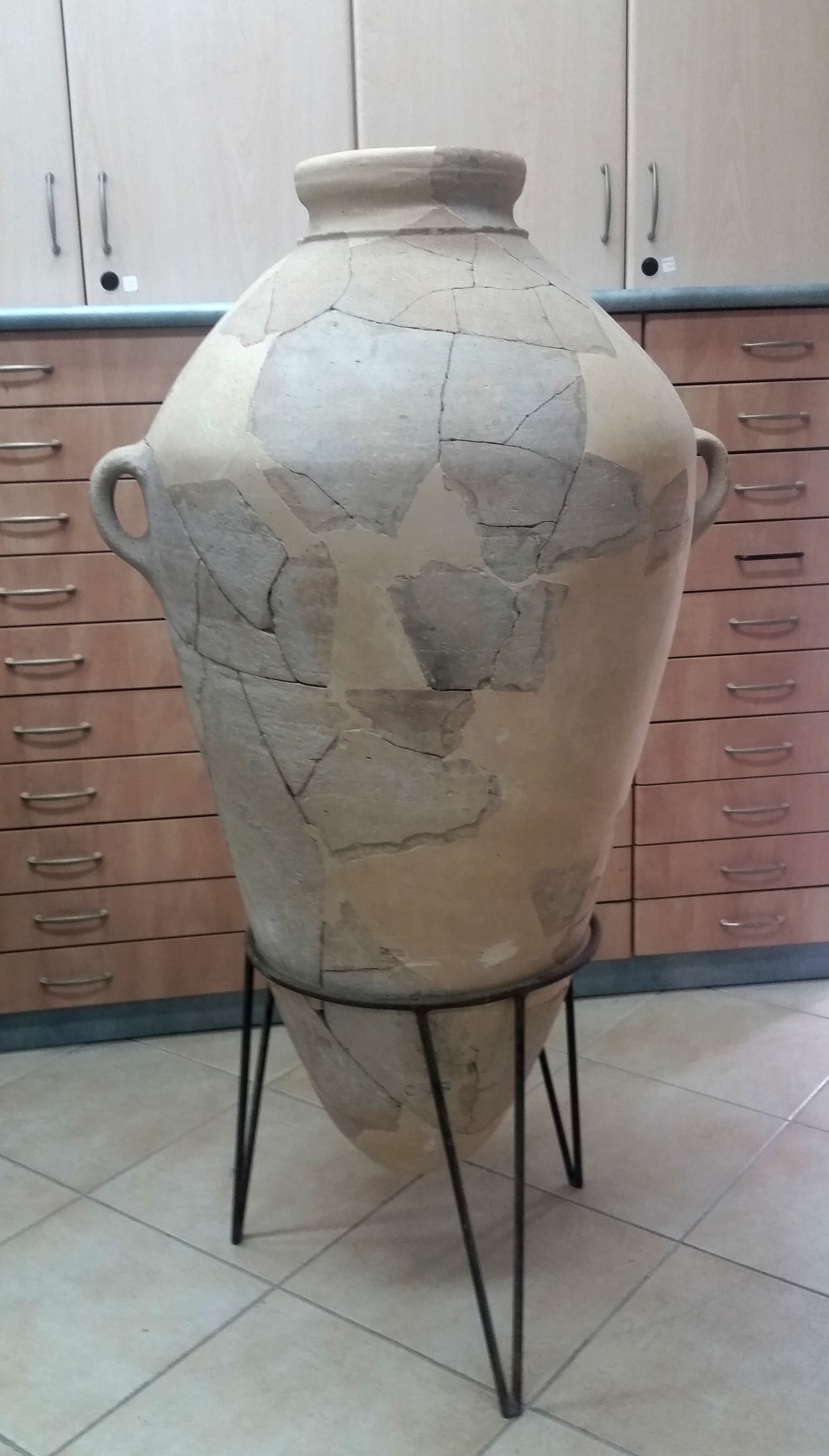 קנקן שפת צווארון. אוסף החוג לארכאולוגיה באוניברסיטת חיפה